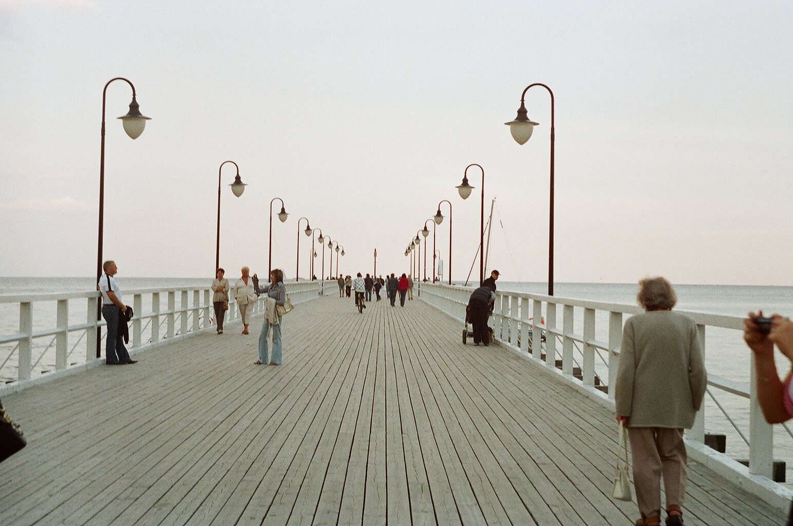 Gdynia's Boardwalk